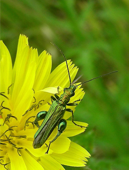 Insecto, A Coruña